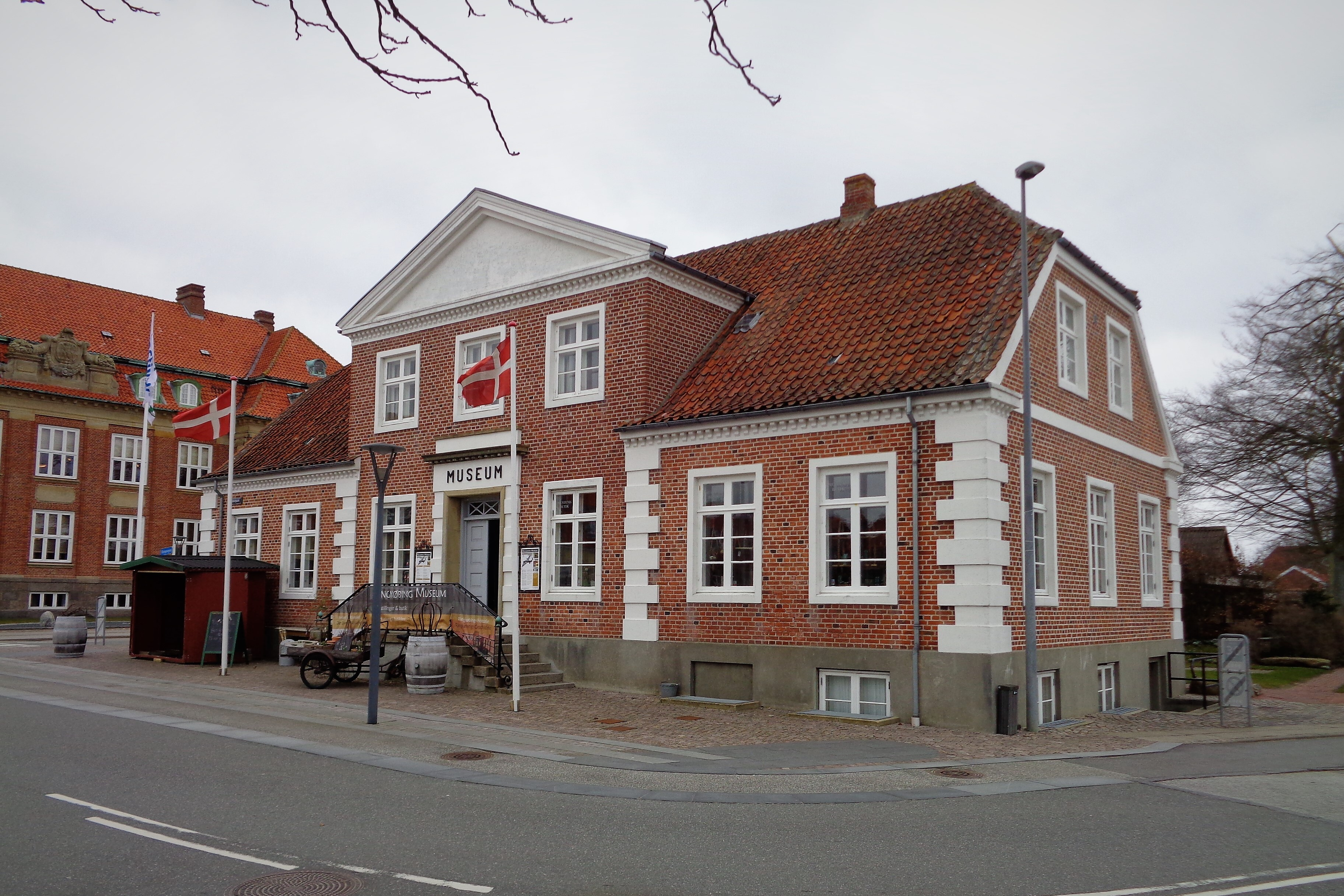 Das Stadtmuseum in Ringkøbing.